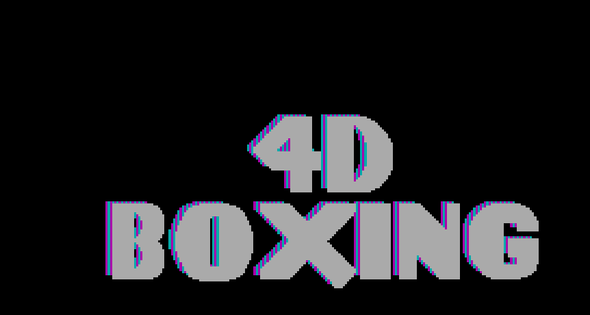 4D Sport boxing se inicia con un texto con el nombre del juego. Esta es la representacion de como se ve en una pantalla CGA